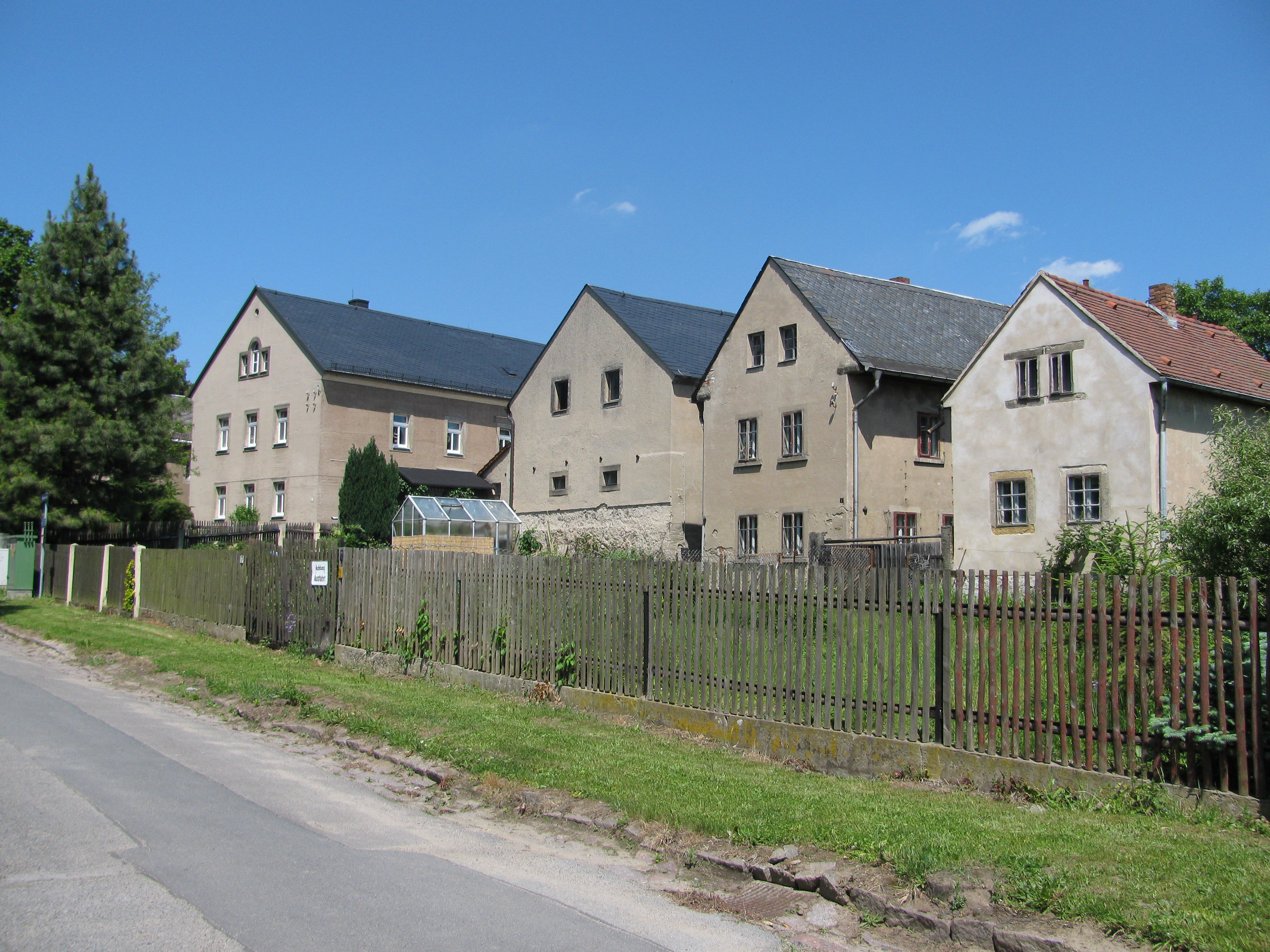 Gebäude in Altrochwitz, Dorfkern von Rochwitz, Stadtteil von Dresden